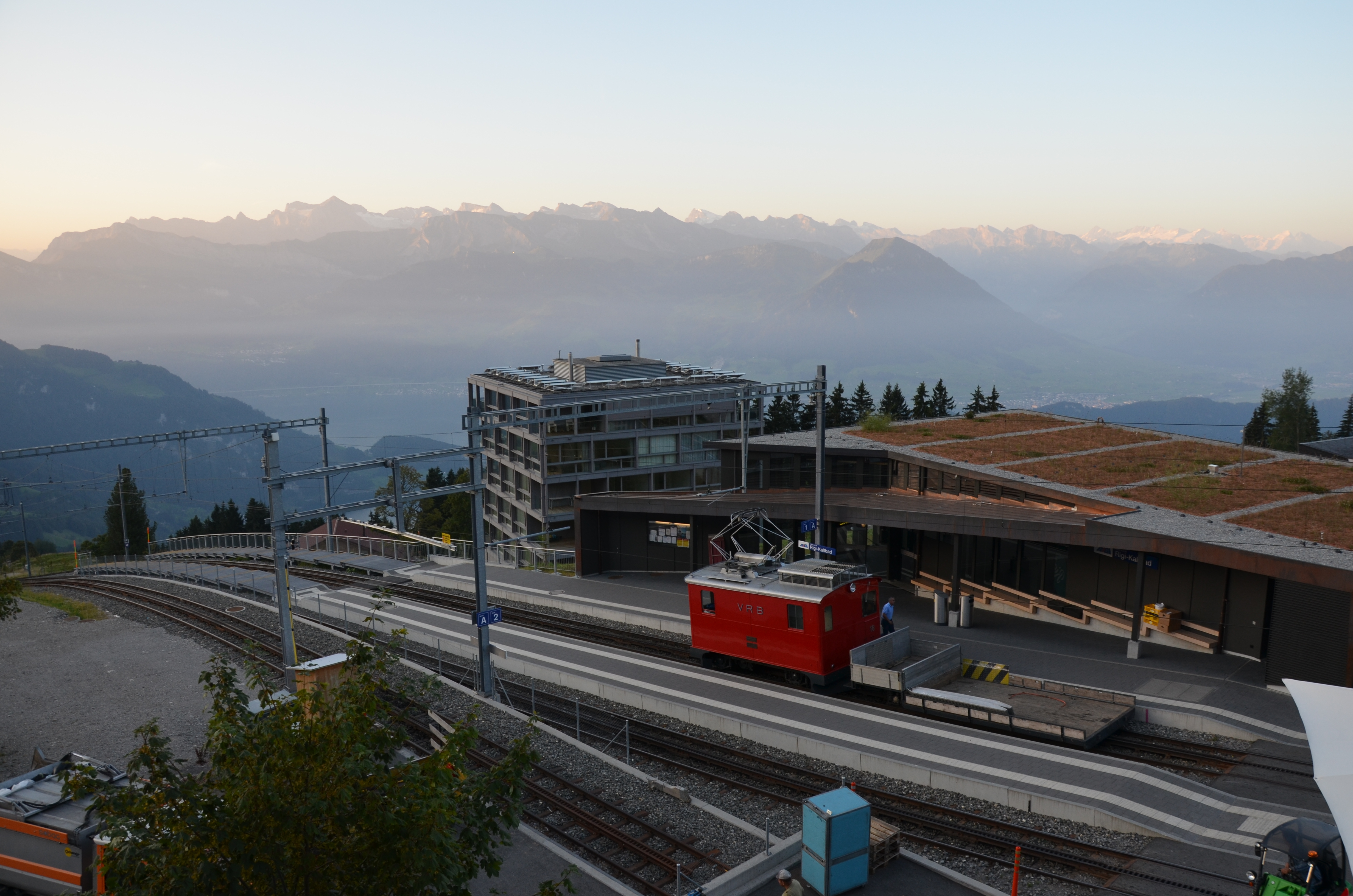 Blick auf das Stationsgebäude von Rigi-Kaltbad. Ein Güterzug steht bereit um die Grosskehrmaschine zurück nach Vitznau zu befördern.